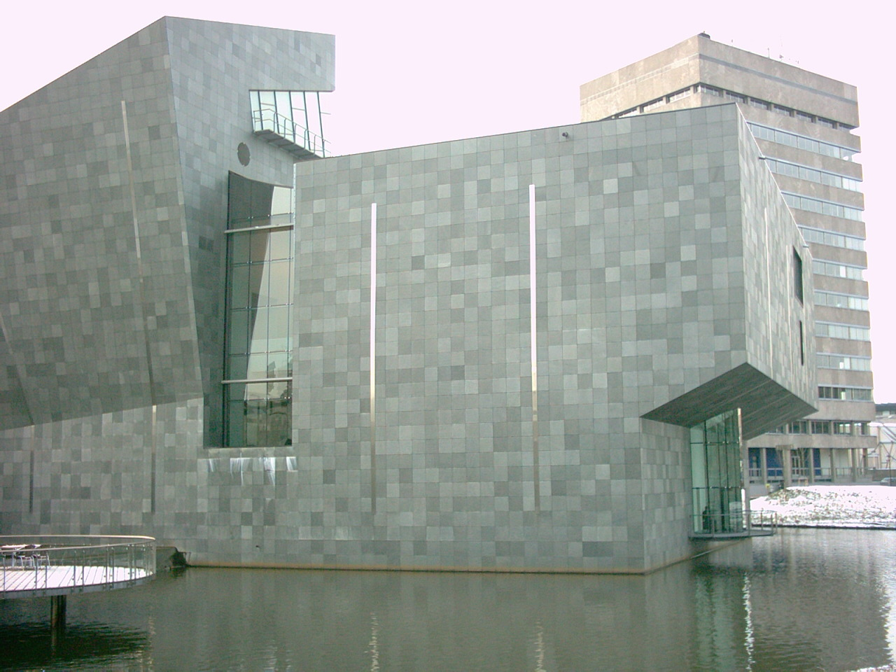 Nieuw van Abbemuseum